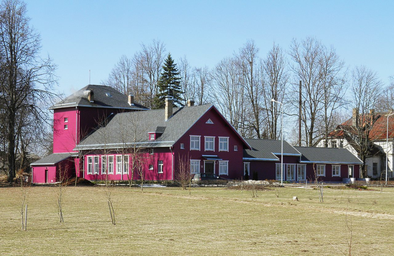 Дом культуры | Kultūras nams (3)